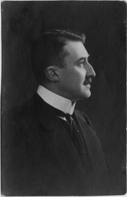 Rolf Lagerborgin